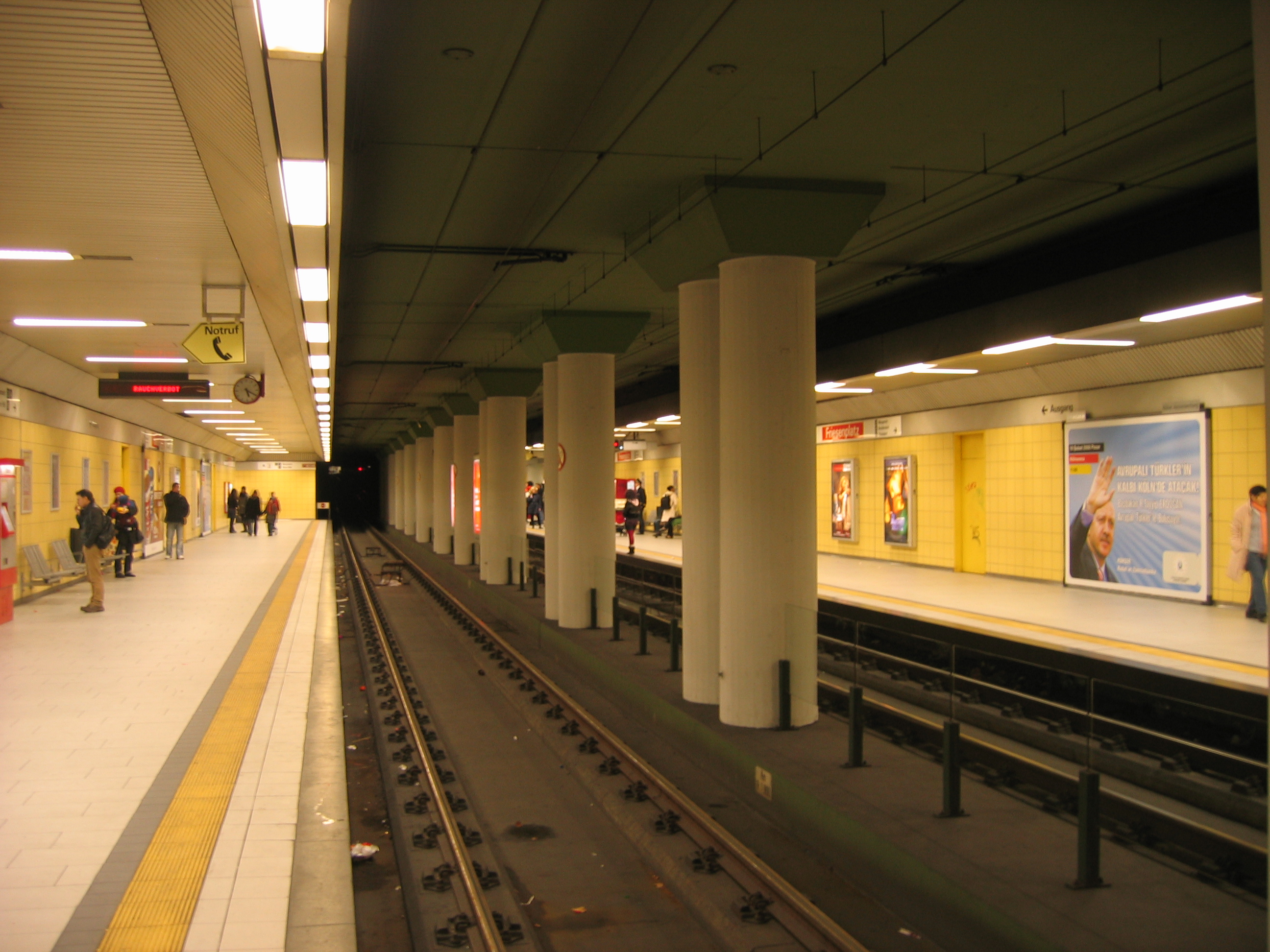 U-Bahn-Station Friesenplatz (untere Ebene) der Stadtbahn Köln